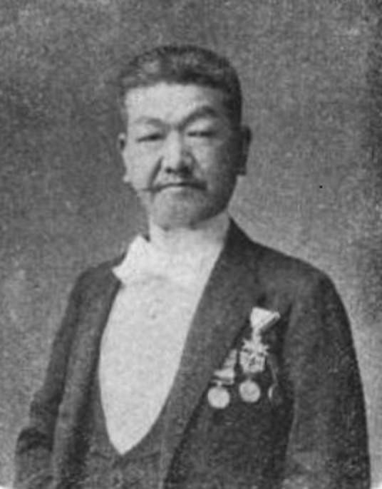 西村総左衛門12代目 千切屋総左衛門 千総